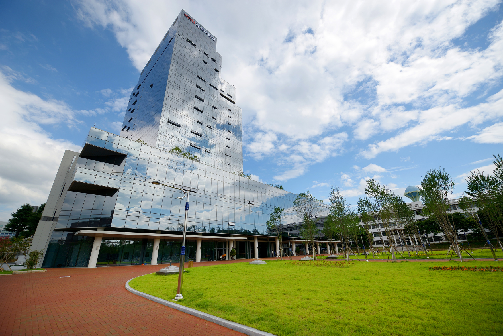 경북대학교 글로벌플라자 사진